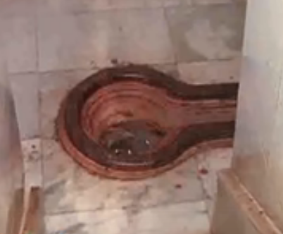 বক্রেশ্বর